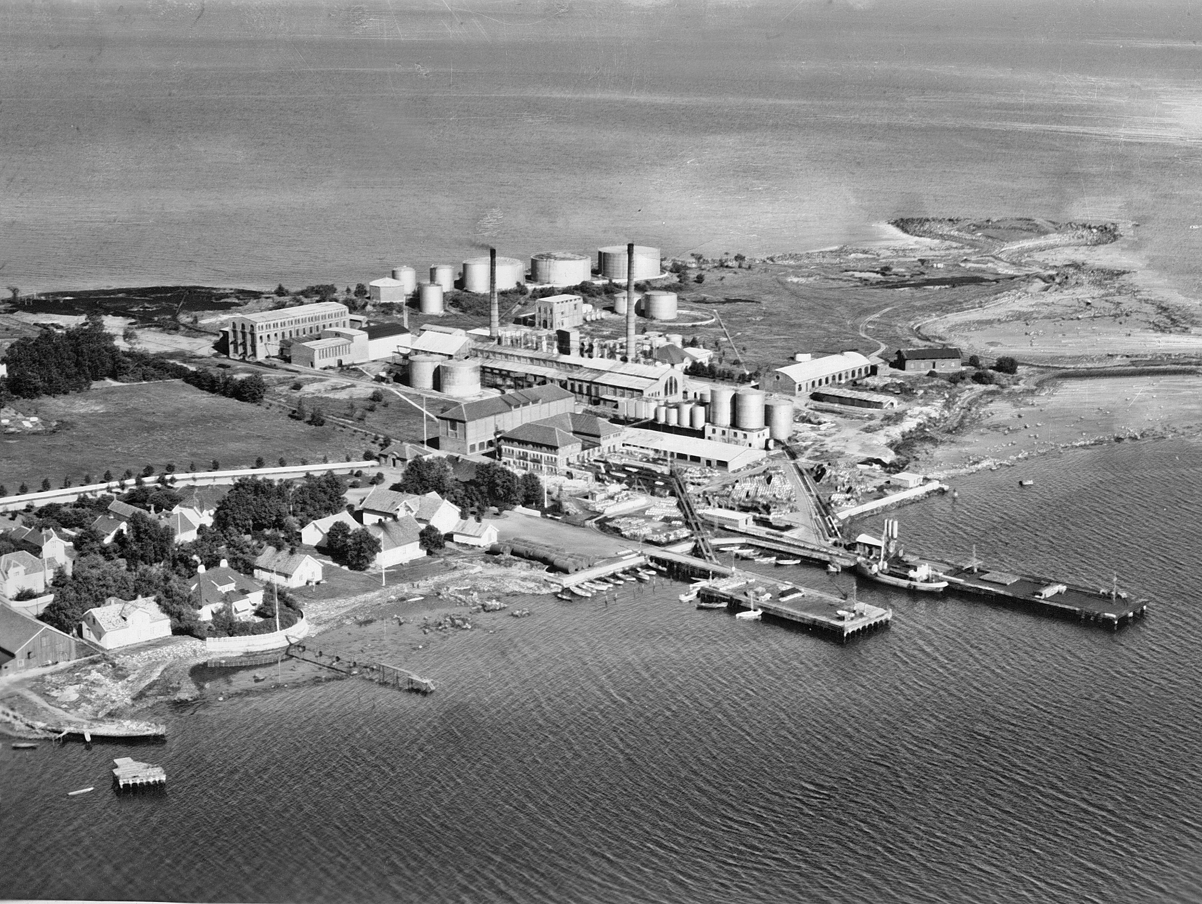 Bildet er hentet fra Arkivverket. Flyfoto Arkivinstitusjon : Statsarkivet i Stavanger Arkivnavn : Pa 1536 - Esso Norge as, Vallø Oljeraffineri og lager Sted : Norge, Vestfold, Tønsberg, Valløy Emneord: Olje, Oljeraffineri, Petroleum Avbildet